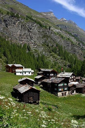 Zum See (Zermatt)